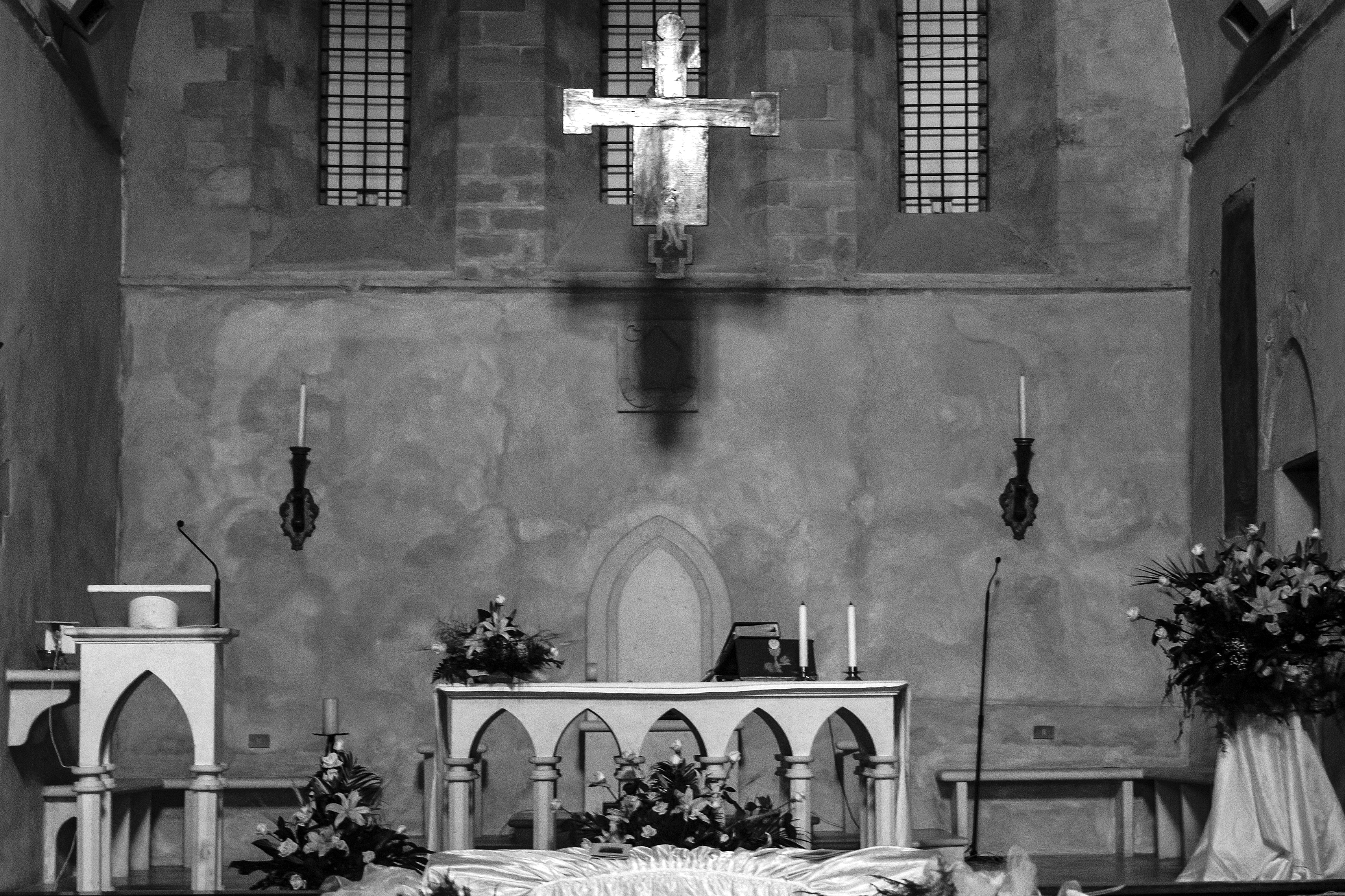 Abbazia della Sambucina This is a photo of a monument which is part of cultural heritage of Italy.